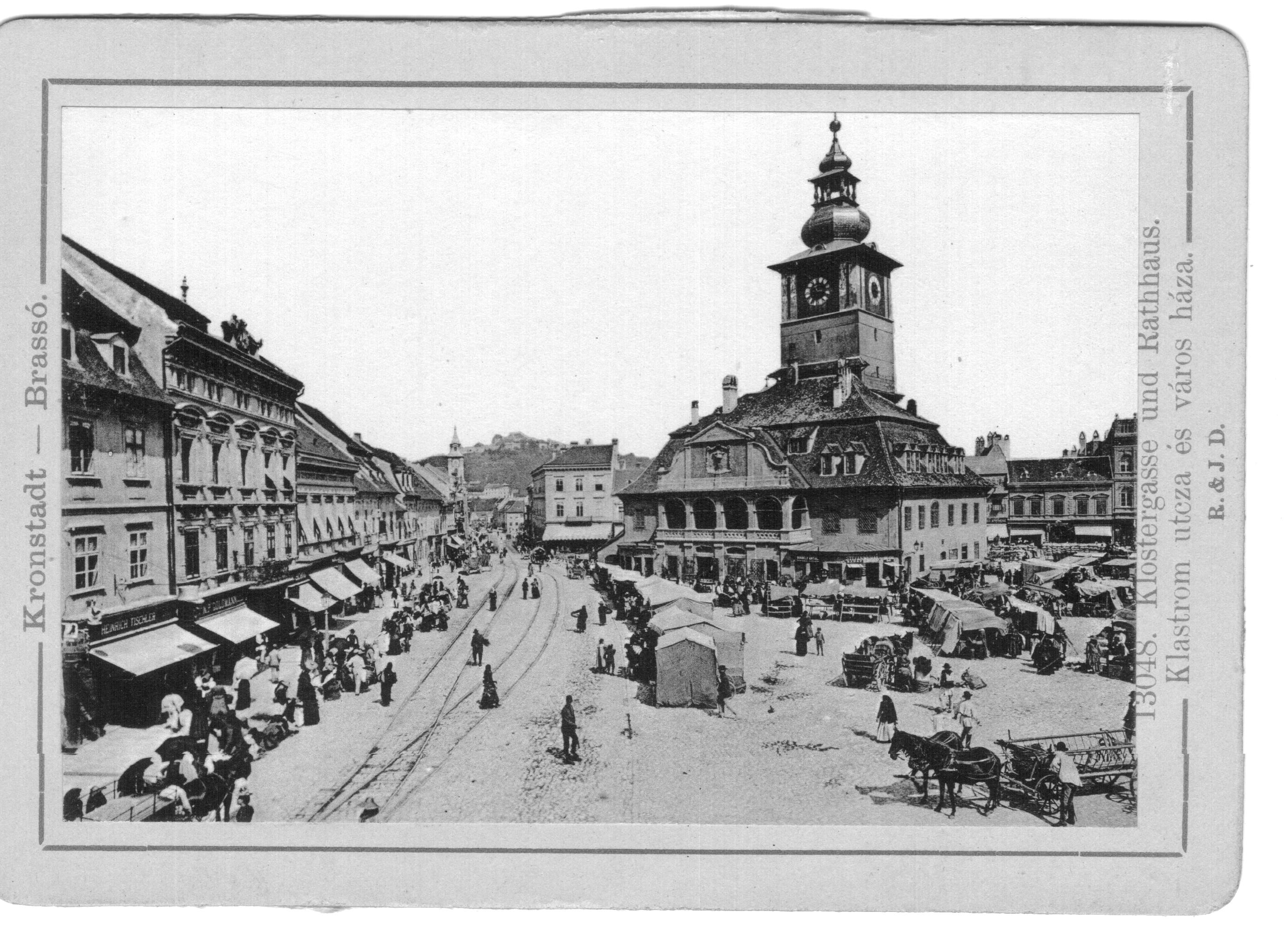 Osztrák-Magyar Monarchia, Brassó. Ismeretlen fényképész This work is in the public domain in its country of origin and other countries and areas where the copyright term is the author's life plus 70 years or less. You must also include a United States public domain tag to indicate why this work is in the public domain in the United States. Note that a few countries have copyright terms longer than 70 years: Mexico has 100 years, Jamaica has 95 years, Colombia has 80 years, and Guatemala and Samoa have 75 years. This image may not be in the public domain in these countries, which moreover do not implement the rule of the shorter term. Côte d'Ivoire has a general copyright term of 99 years and Honduras has 75 years, but they do implement the rule of the shorter term. Copyright may extend on works created by French who died for France in World War II (more information), Russians who served in the Eastern Front of World War II (known as the Great Patriotic War in Russia) and posthumously rehabilitated victims of Soviet repressions (more information). This file has been identified as being free of known restrictions under copyright law, including all related and neighboring rights. . 12 fényképből álló fényképalbum. A fényképet 2010. november 6 -án szkenneltem. A 12-0 jelzésű fénykép a fényképalbum borítója. ©© Megjelent Creative Commons alatt a Metapolisz sorozatban. A Metapolisz sorozat valamennyi képe és filmje Creative Commons alatti valamint kereskedelmi - for profit - célra is felhasználható. Ajánlott hivatkozás: Derzsi Elekes Andor: Metapolisz DVD line ©© Published under Creative Commons in the Metapolisz DVD line. All of the photos and vids in the Metapolisz DVD line are under Creative Commons and can be used even for commercial – for profit – purposes. Recommended Citation Derzsi Elekes Andor: Metapolisz DVD line